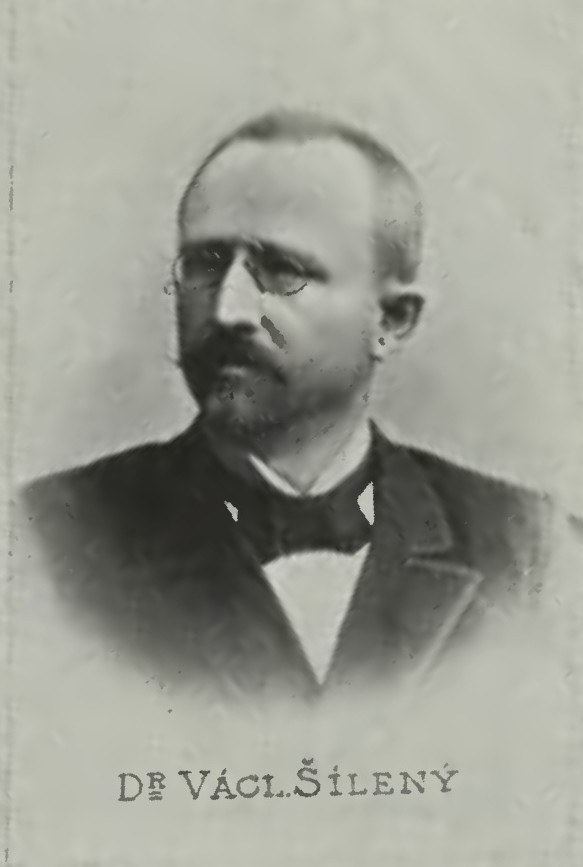 Portrét – Václav Šílený (1849-1911), Český právníka a politik.